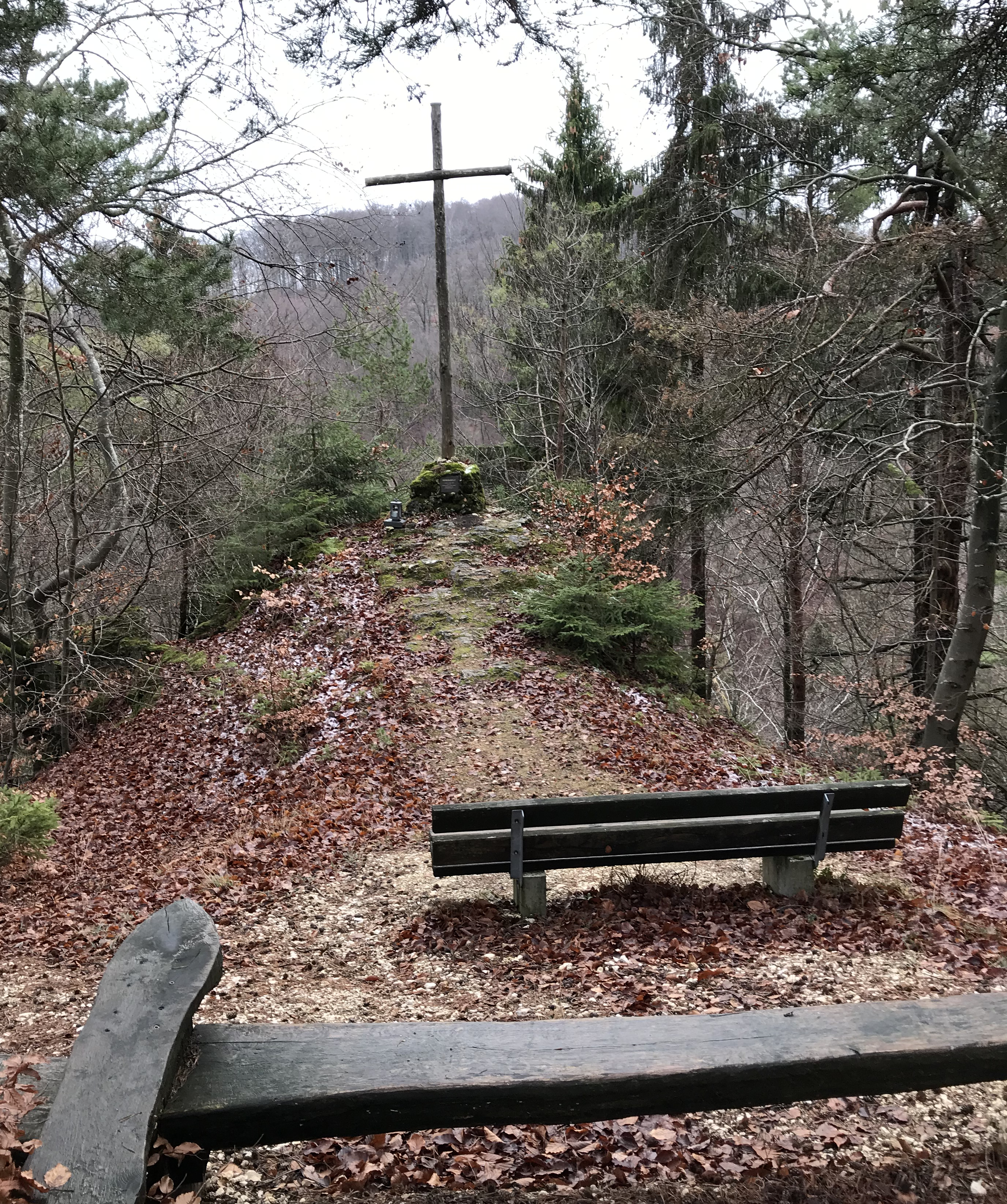 Bergkreuz auf dem Dreikönigsfelsen westlich oberhalb von Aalen-Unterkochen, am 1. Juli 1944 von der katholischen Jugend Aalen zum Zeichen des Widerstands errichtet.